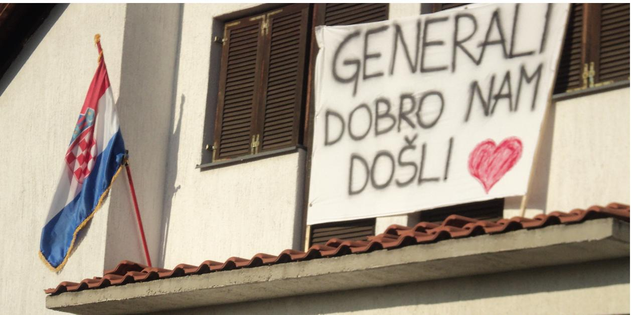 Natpis na kući u Vukovaru nakon oslobađujuće presude 2012-11-18